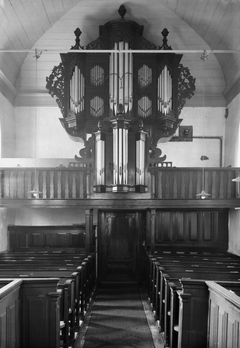 Nederlands Hervormde Kerk: Kerkinterieur met orgel